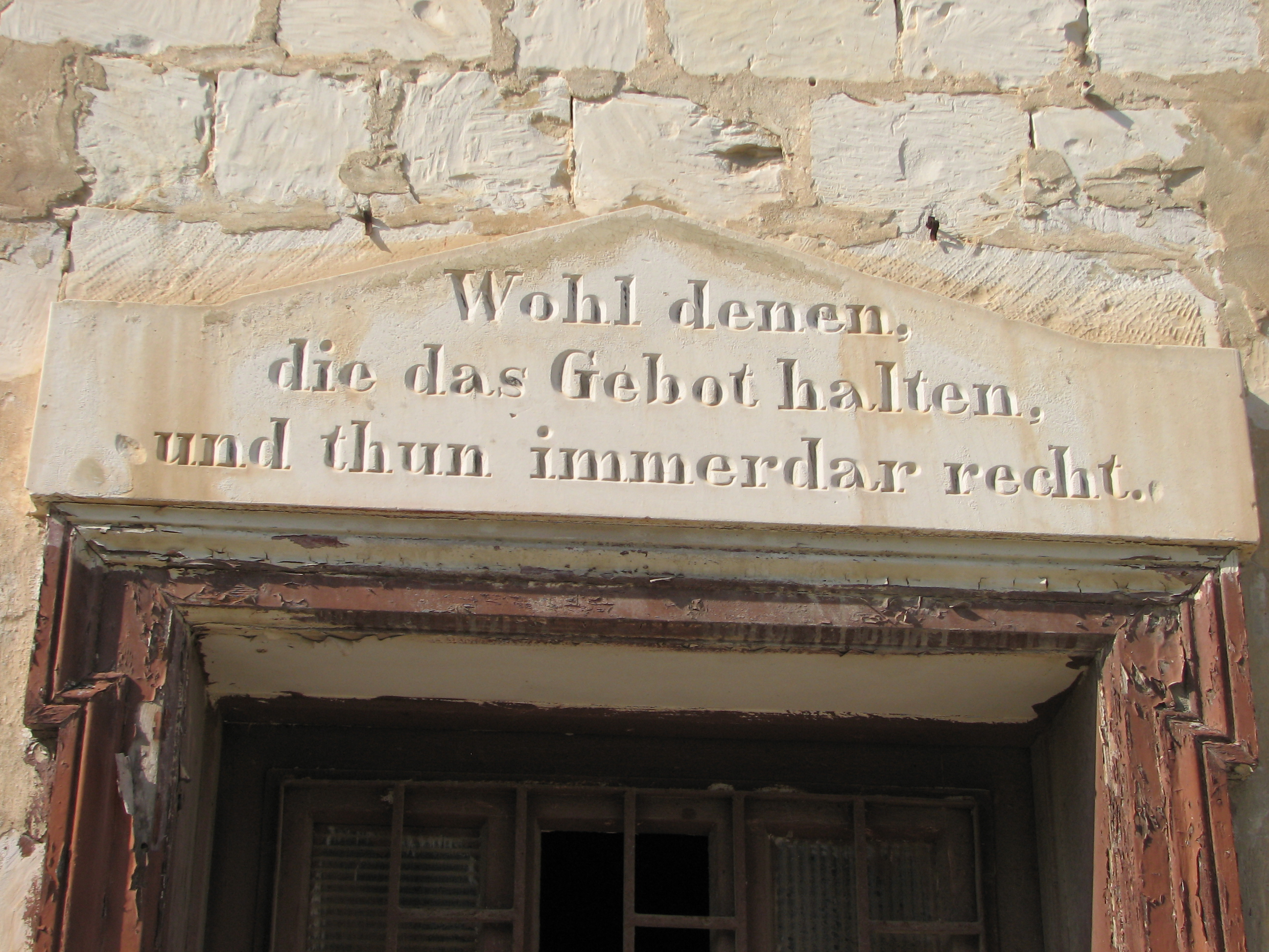 Beit Oliphent, Haifa. The house of Laurence Oliphant . בית אוליפנט במושבה הגרמנית בחיפה שדרות בן גוריון 16 ביתו של לורנס אוליפנט לוח האבן מעל הדלת בחזית. הכותבת בגרמנית קוראת "Wohl denen, die das Gebot halten und tun immerdar recht" - תרגום לותר לתהילים ק"ו, ג: "אַשְׁרֵי שֹׁמְרֵי מִשְׁפָּט; עֹשֵׂה צְדָקָה בְכָל-עֵת".